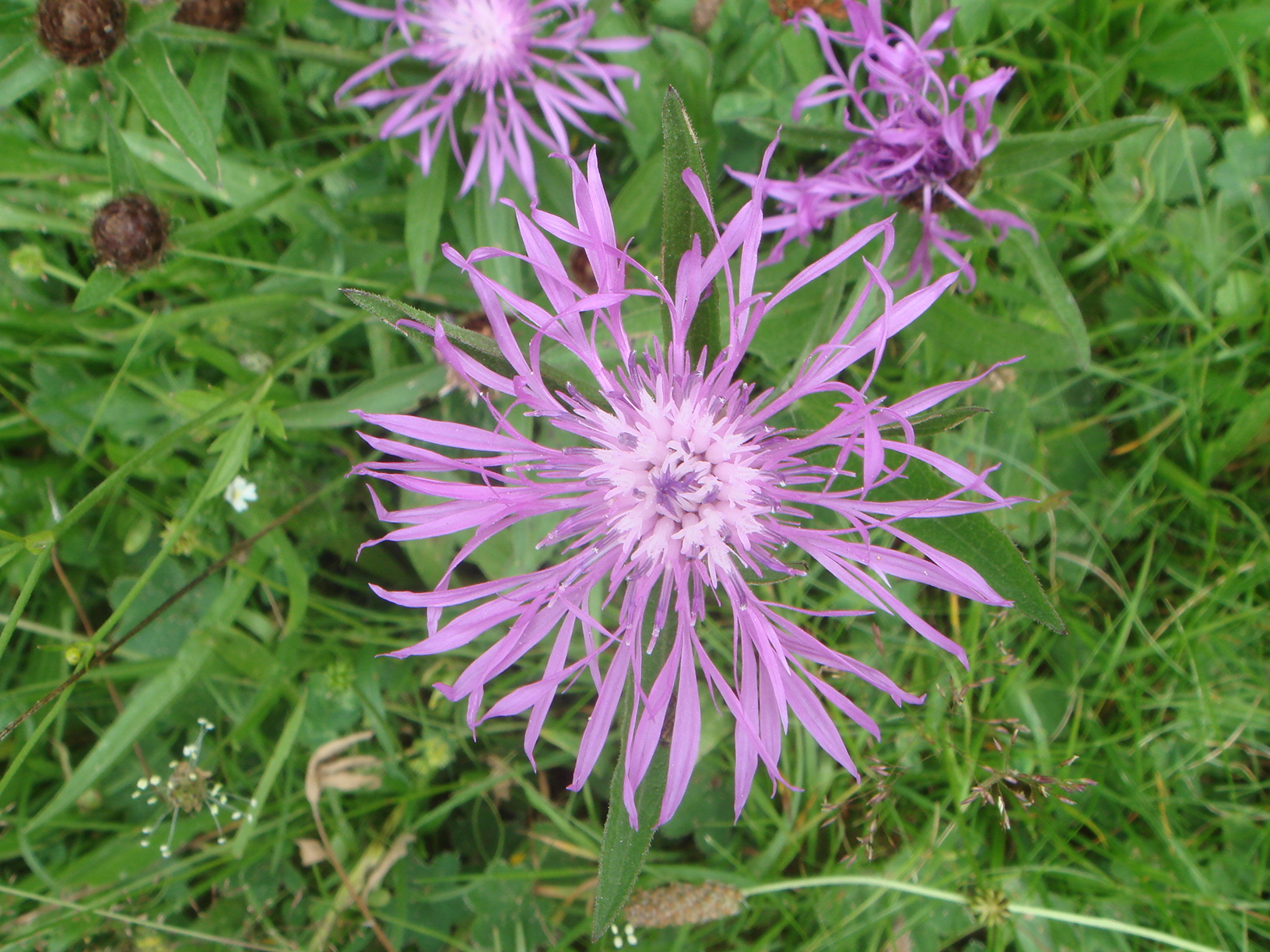 Centaurea nigra, Valle de Ordesa, Pirineos, España